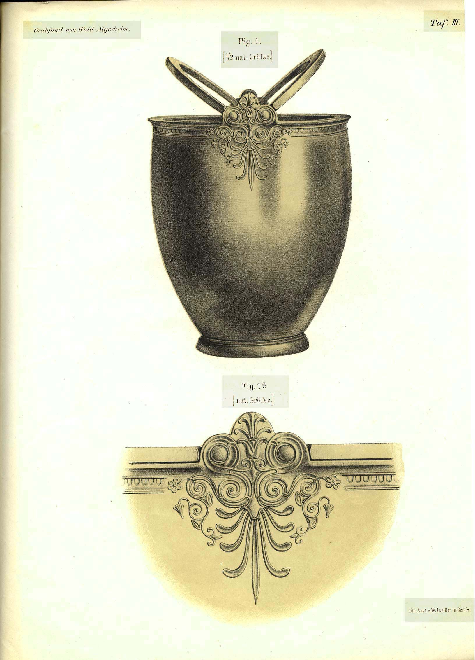 Grabfunde des Waldalgesheimer Fürstengrabes